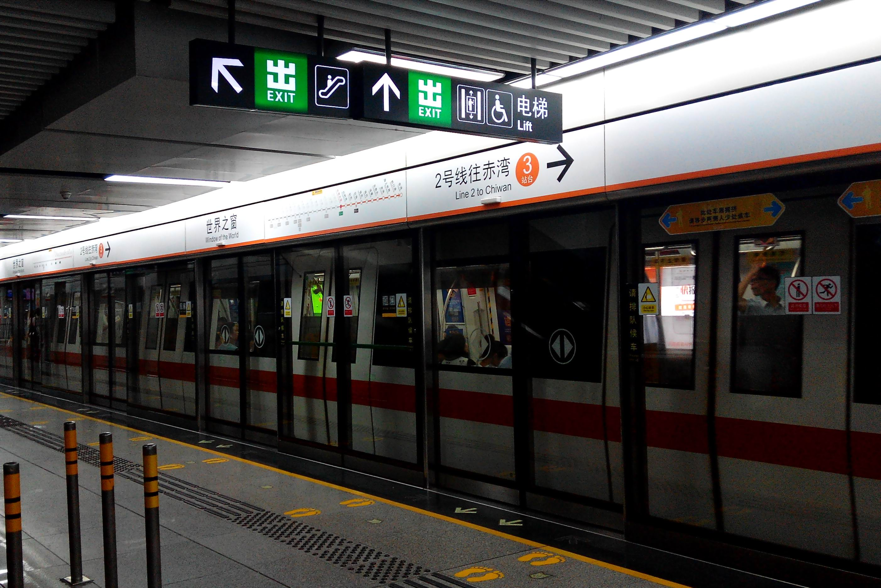 深圳地铁2号线 世界之窗站 3号站台